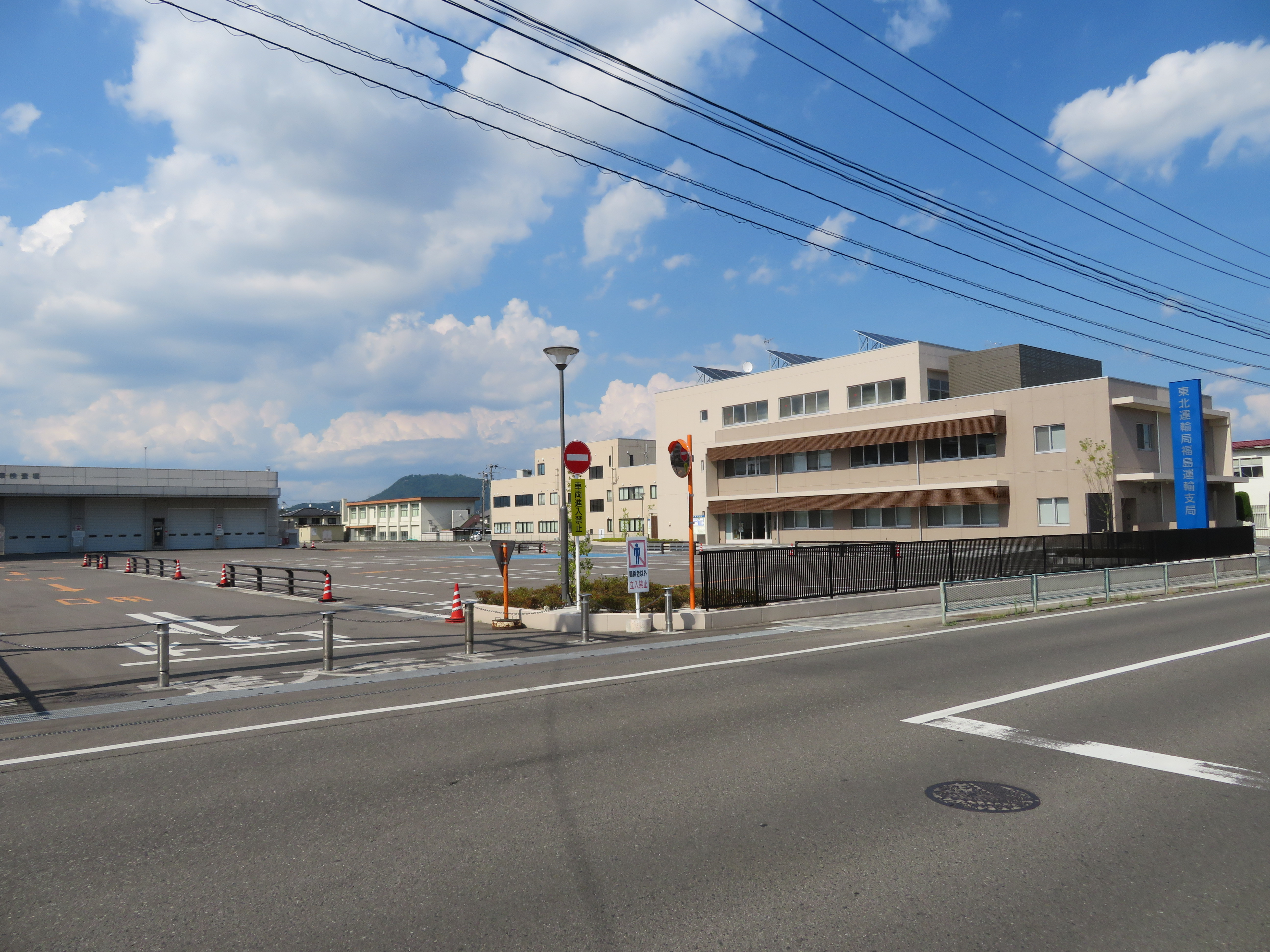 福島運輸支局庁舎 Canon PowerShot SX720 HS